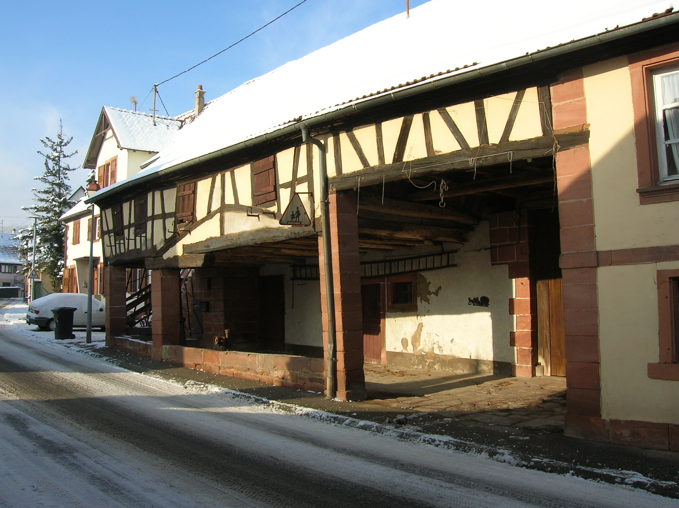 Winburi, Unterelsàss